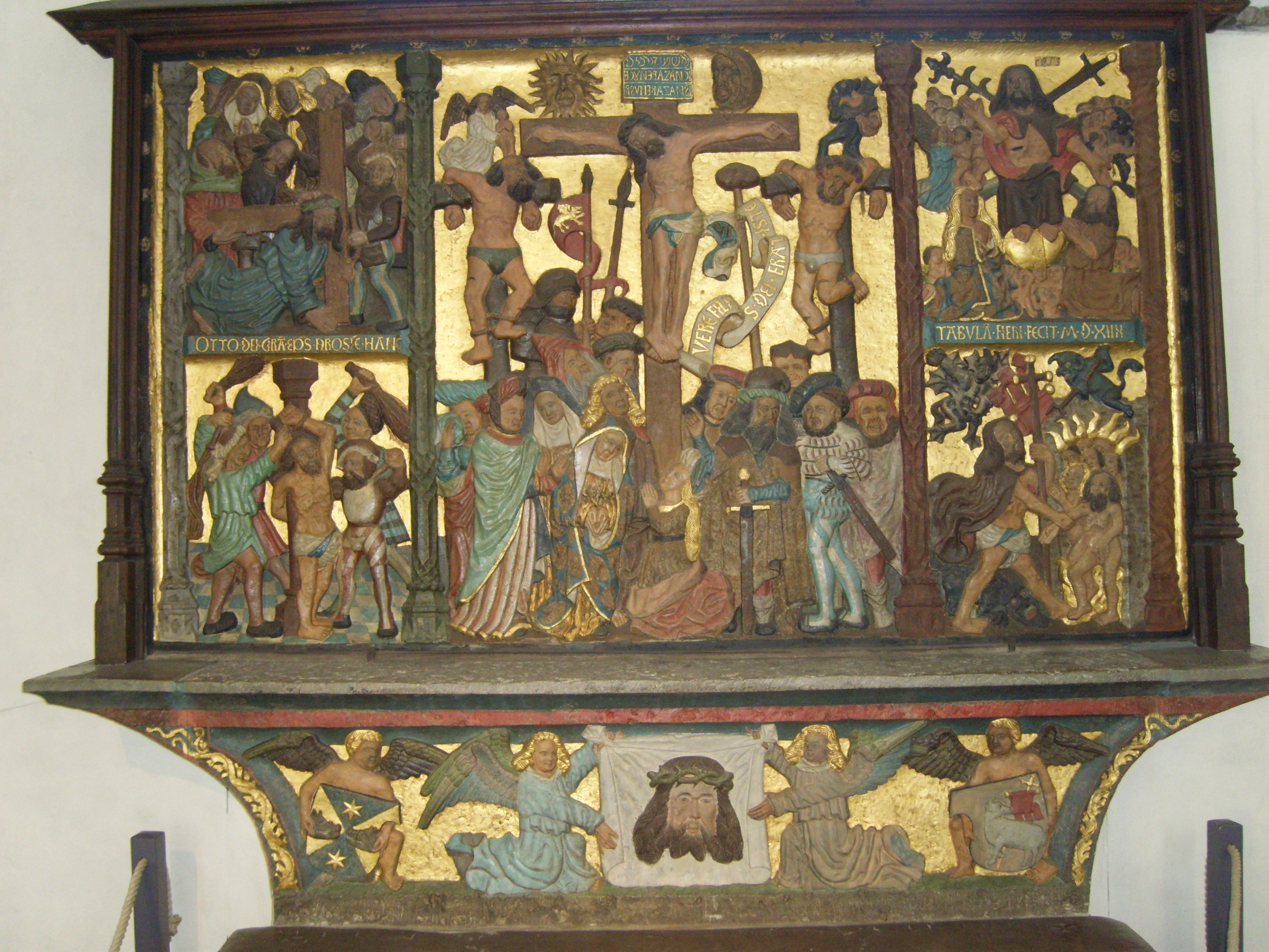 Aufsatz des Altars der Veronica von 1514; Geschenk von Bischof Otto Svinhufvud